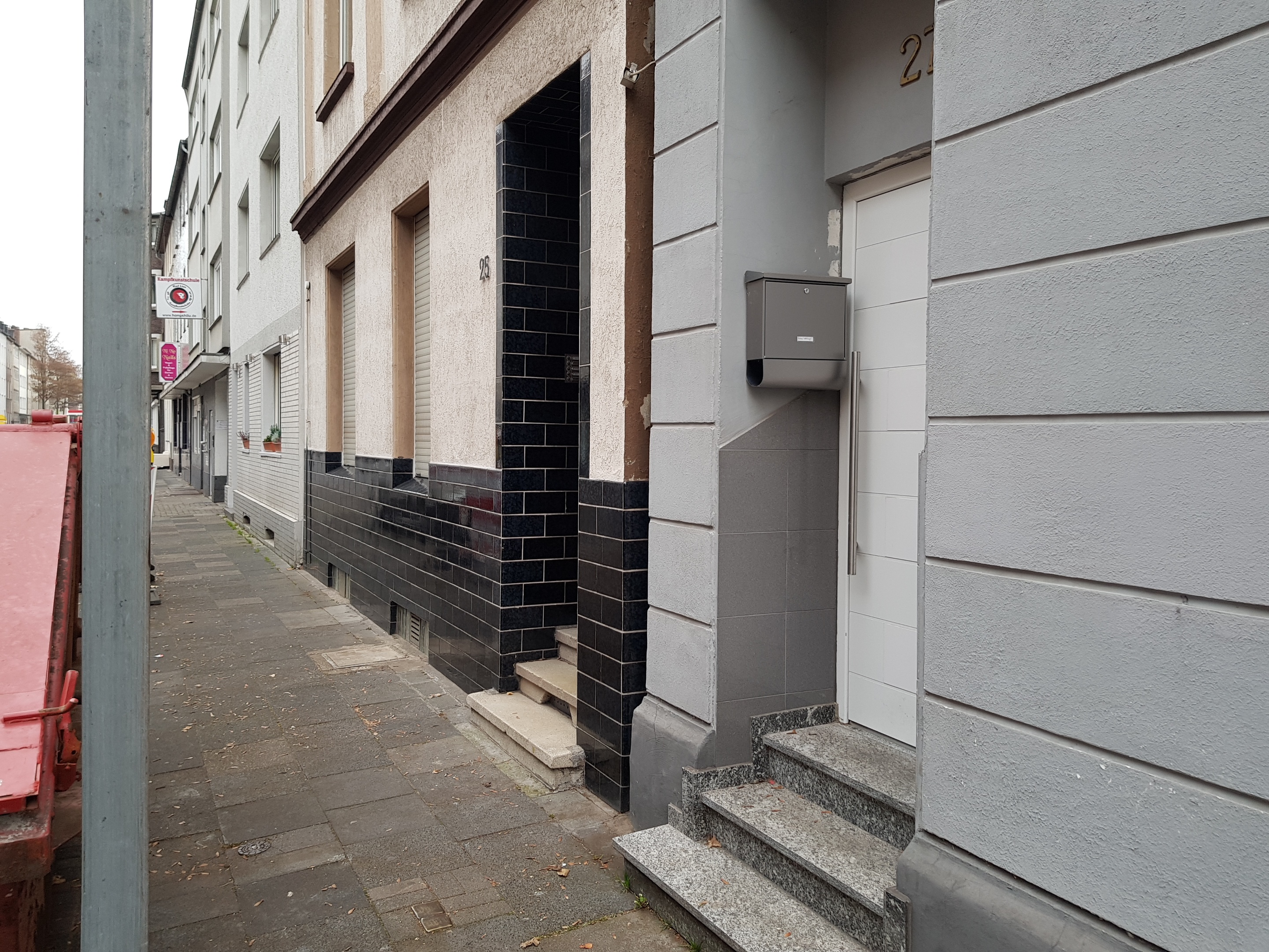 Stolperstein Grabens. 27, Duisburg-Neudorf